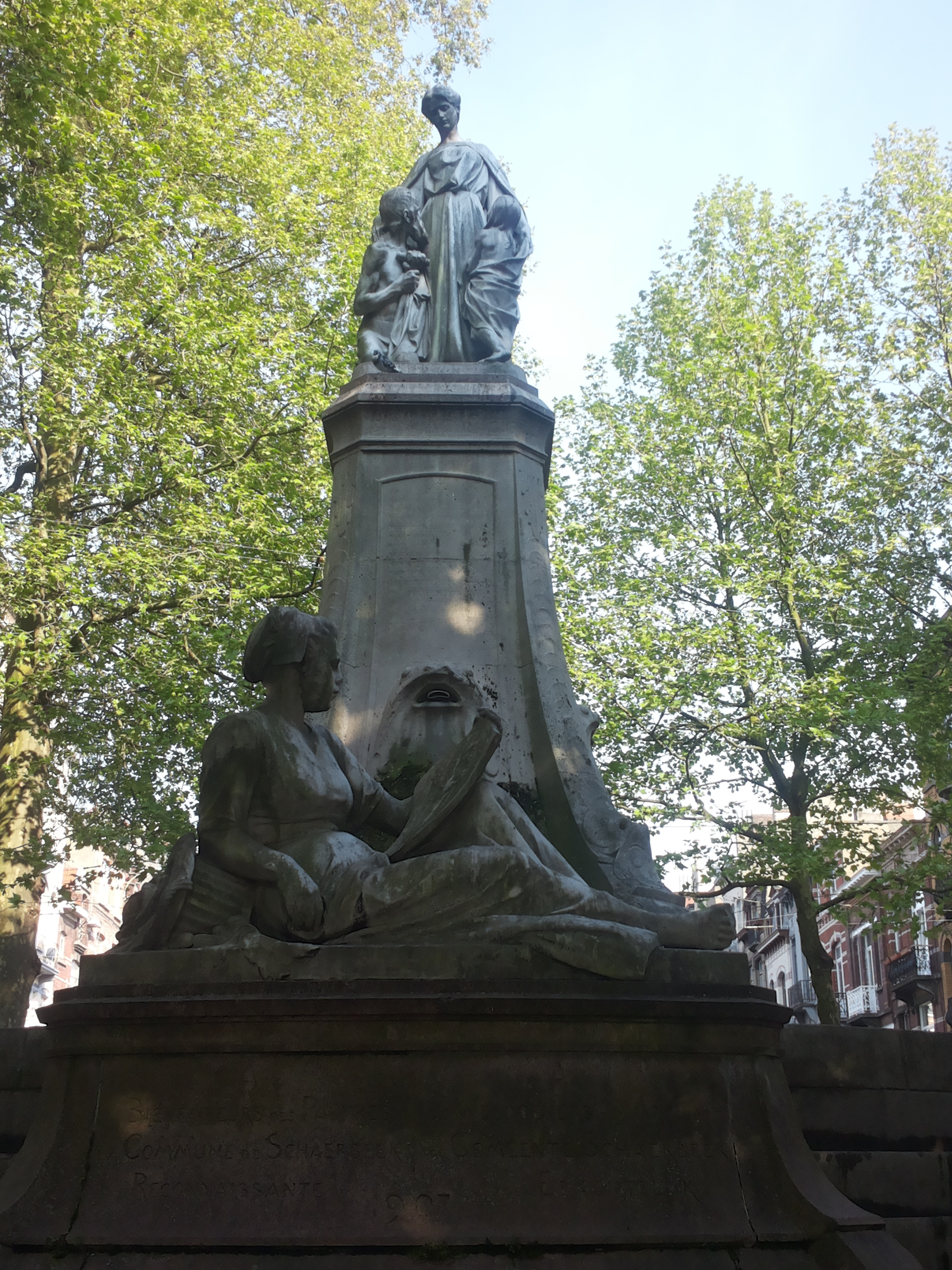 Weldoenersmonument Schaarbeek